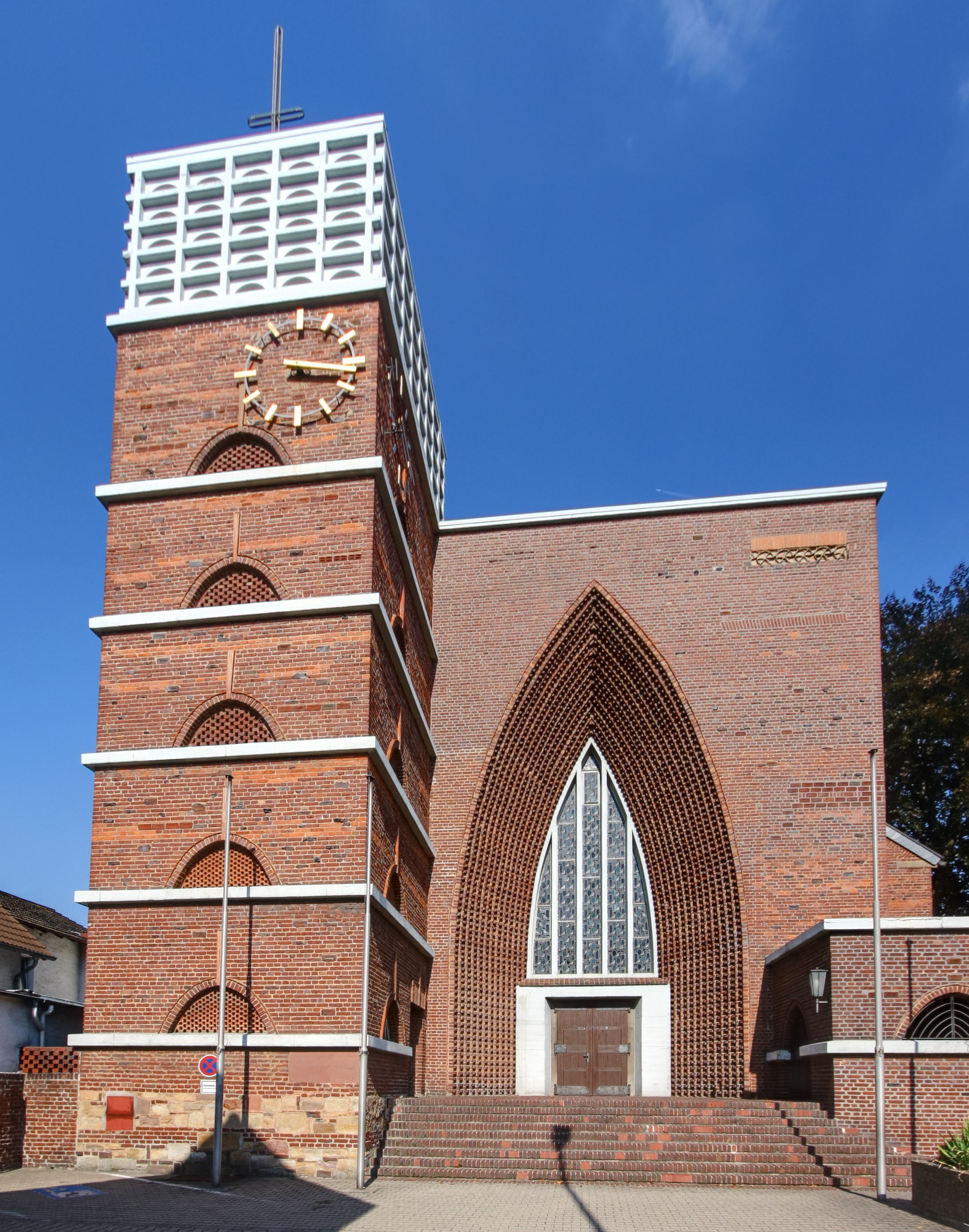 Pfarrkirche Christkönig in Bischofsheim/Mainspitze. Portal und Turm.